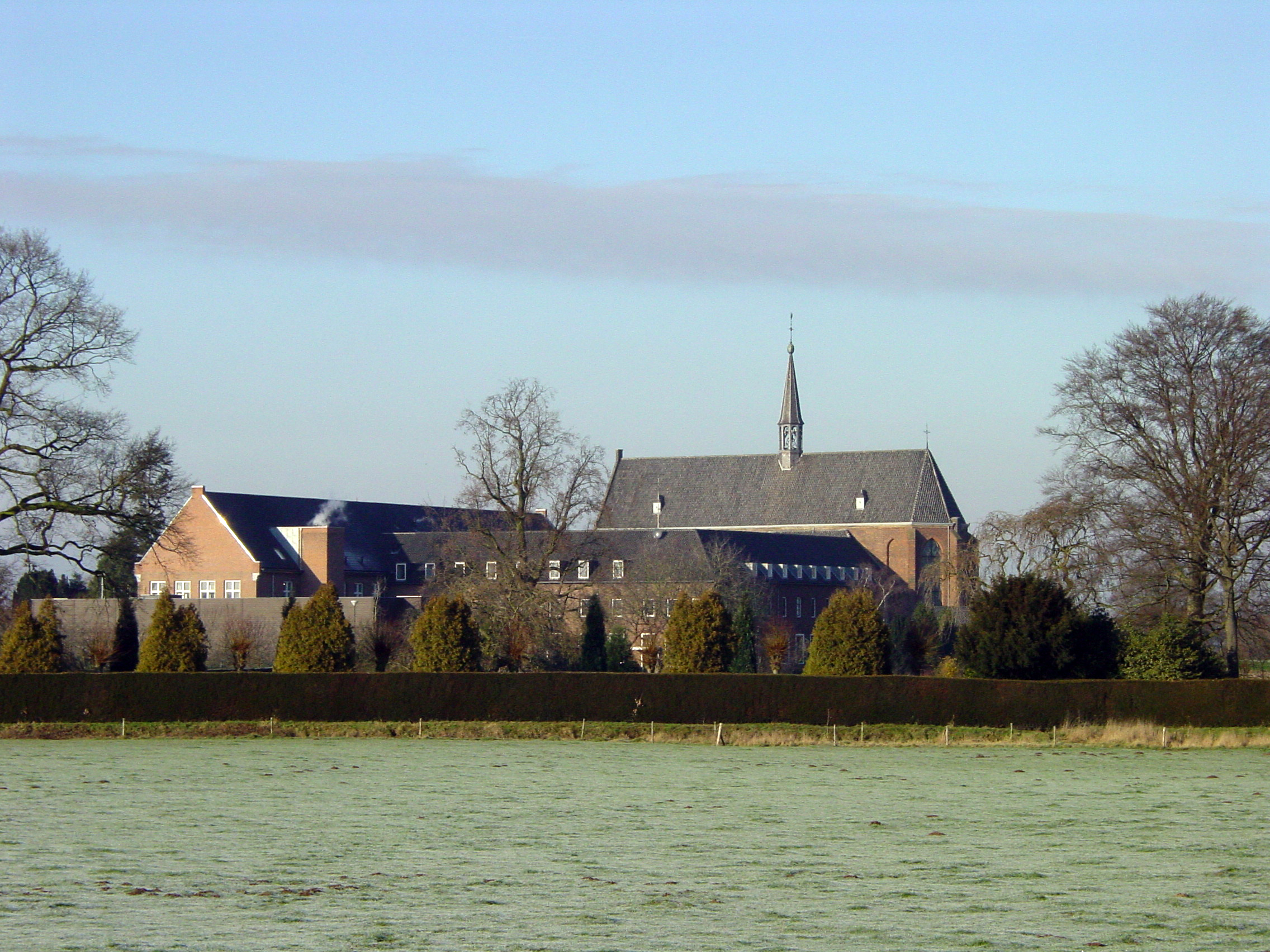 Een aantal cultuurmonumenten op deze foto: het klooster, de kloostertuin, de beschermde monumentale bomen in deze tuin en het cultuurlandschap waarin dit geheel ligt.